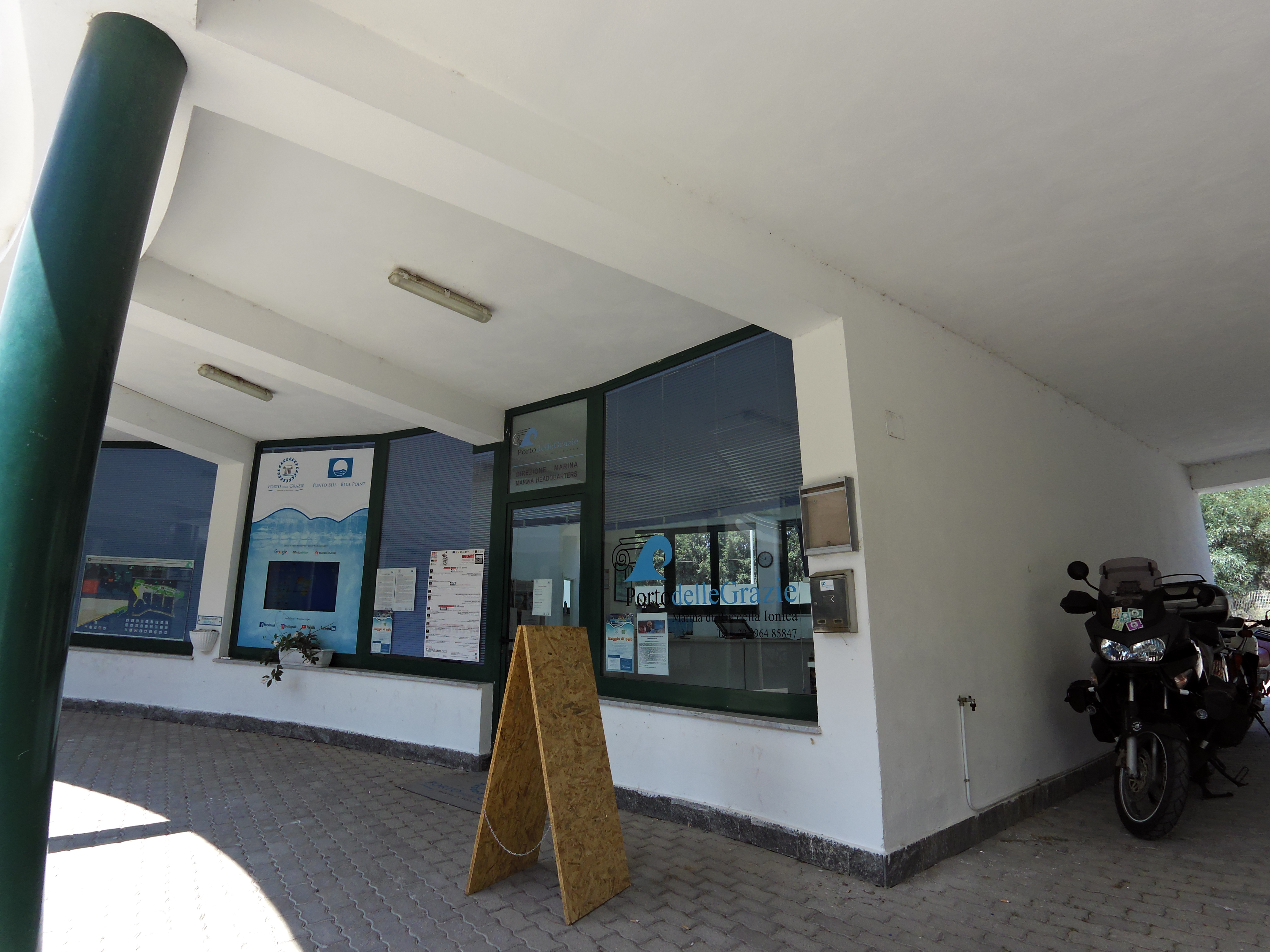 Porto delle grazie a Roccella Jonica